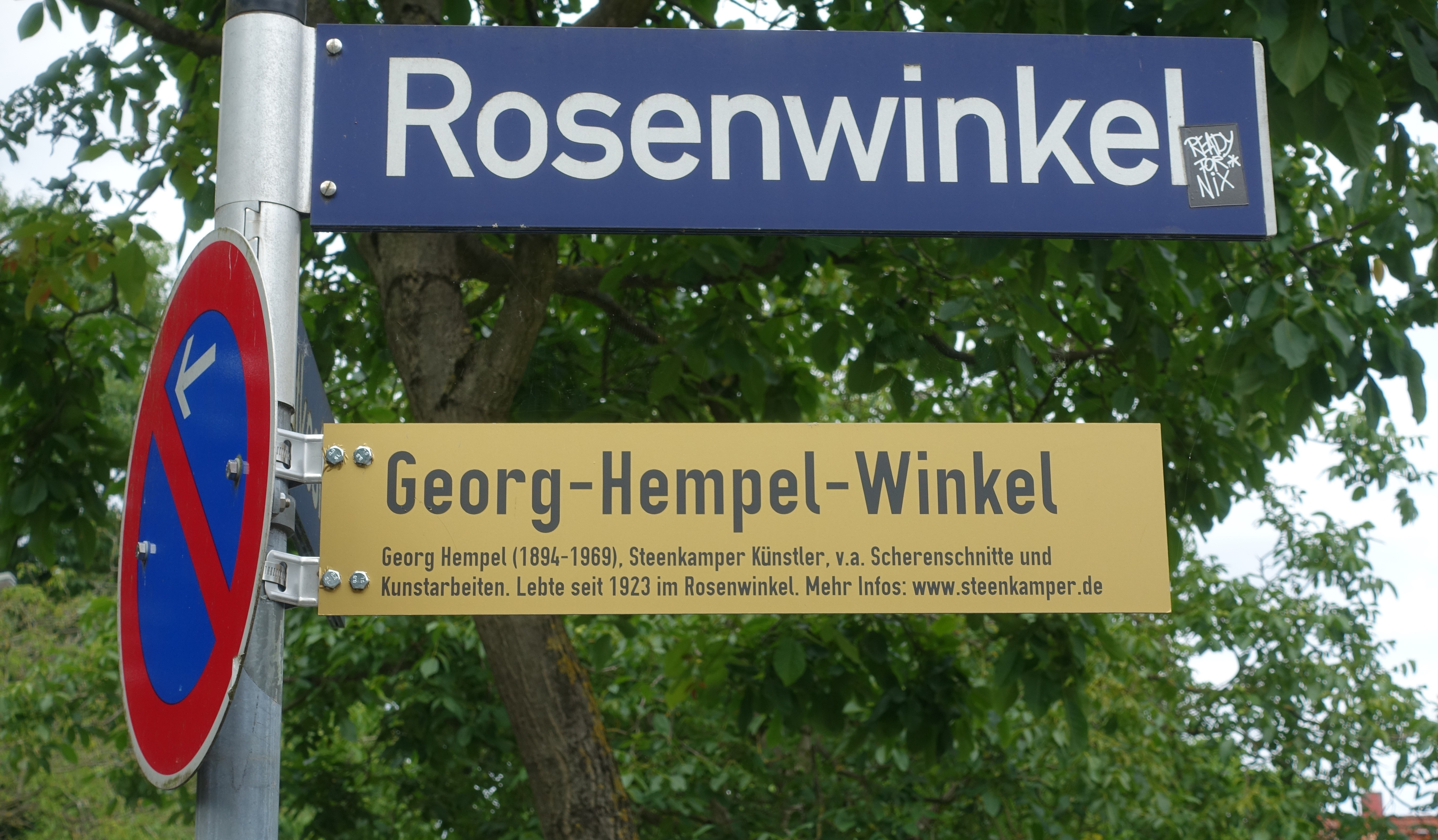 Straßenschild zu Georg Hempel im Rosenwinkel (Steenkampsiedlung)